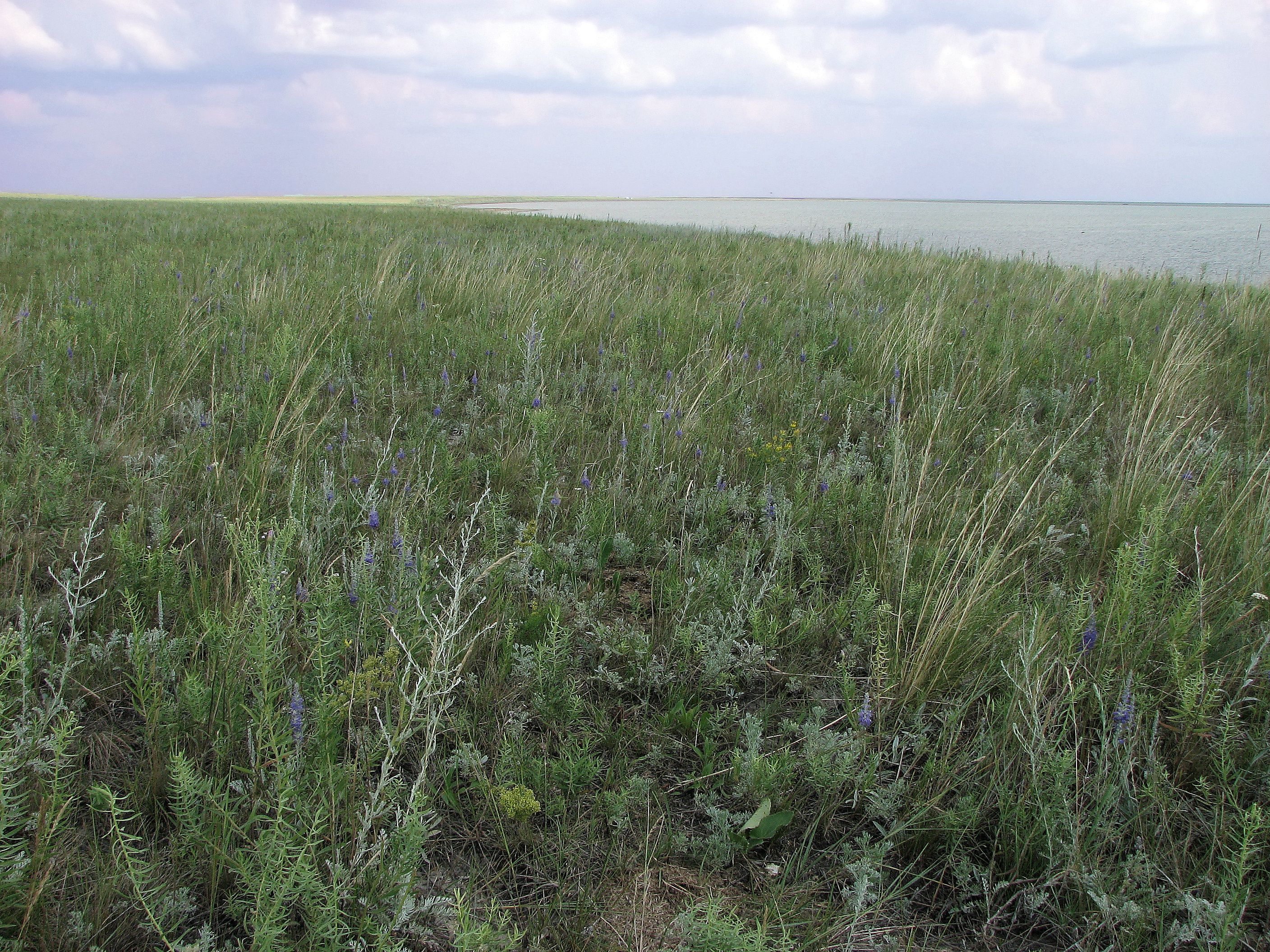 Берег озера Ульжай